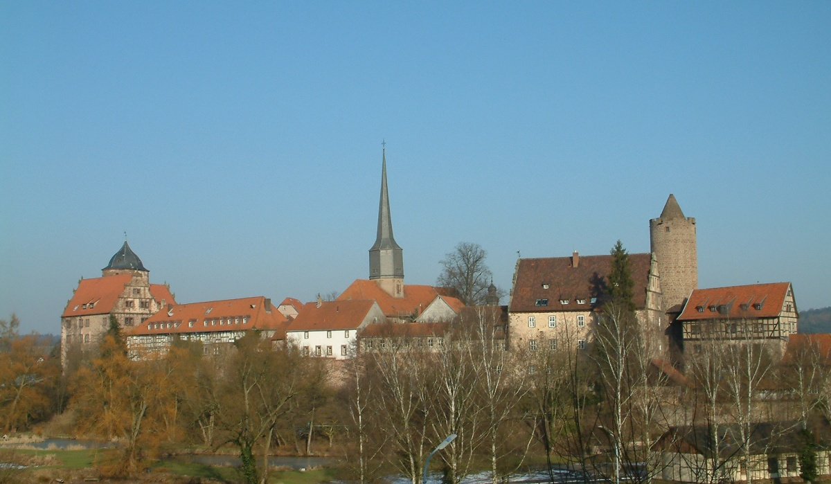 Burgenstadt Schlitz